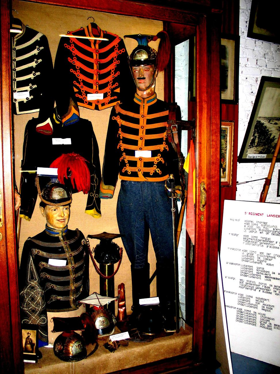 Belgische lansiers - eigen foto